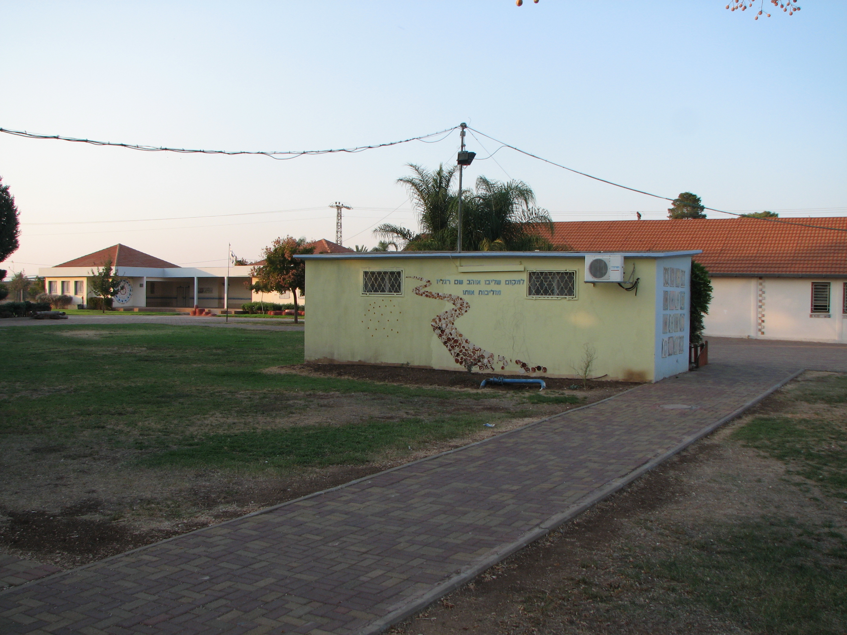 בית הספר "עמק יפה" במרכז אומן